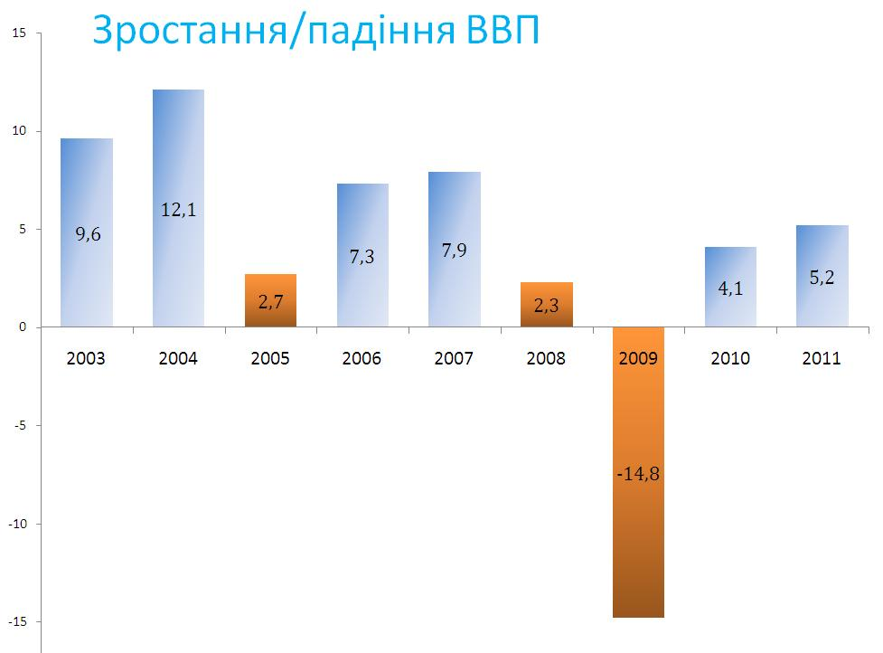 ВВП Украины